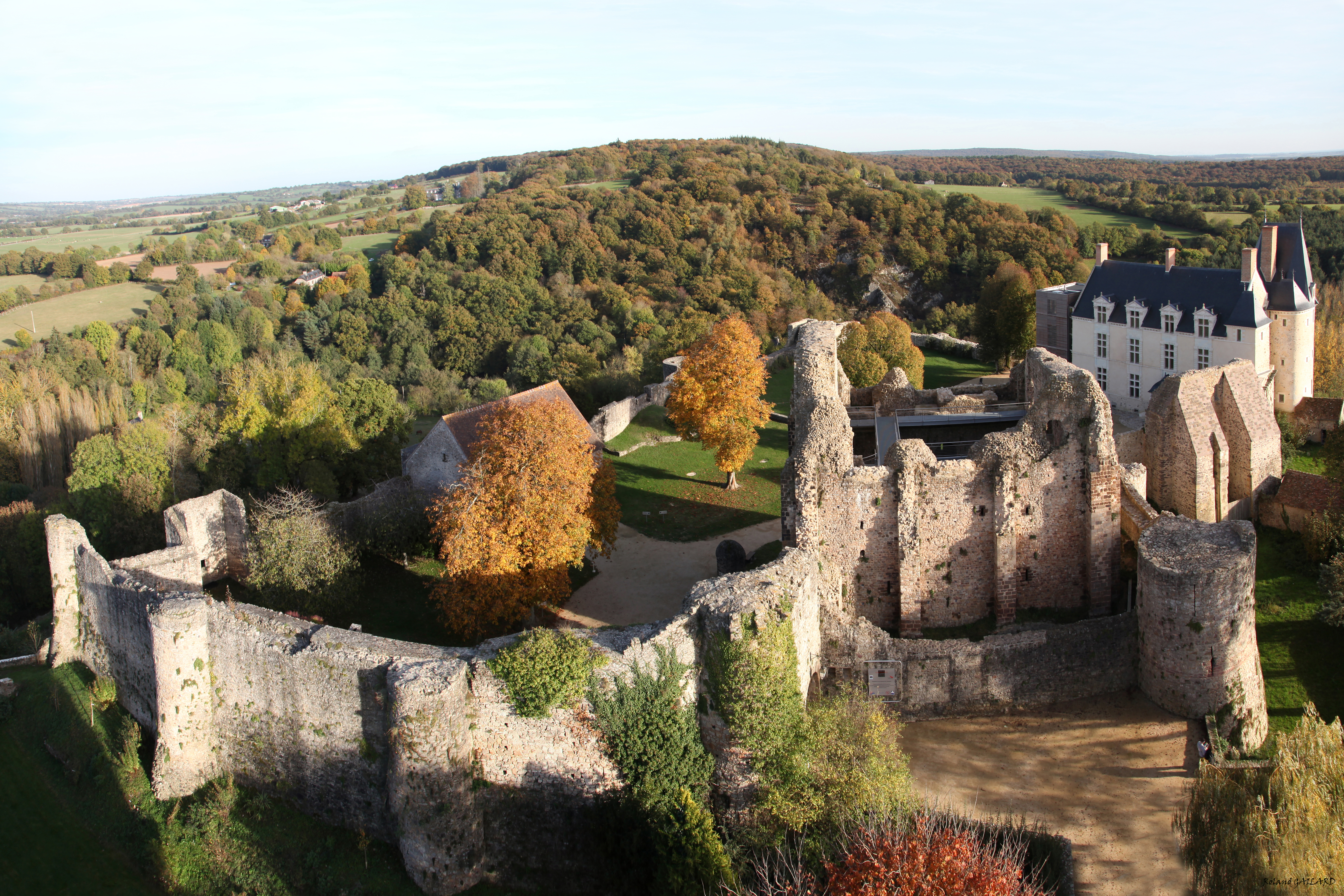 Chateau Ste-Suzanne 53